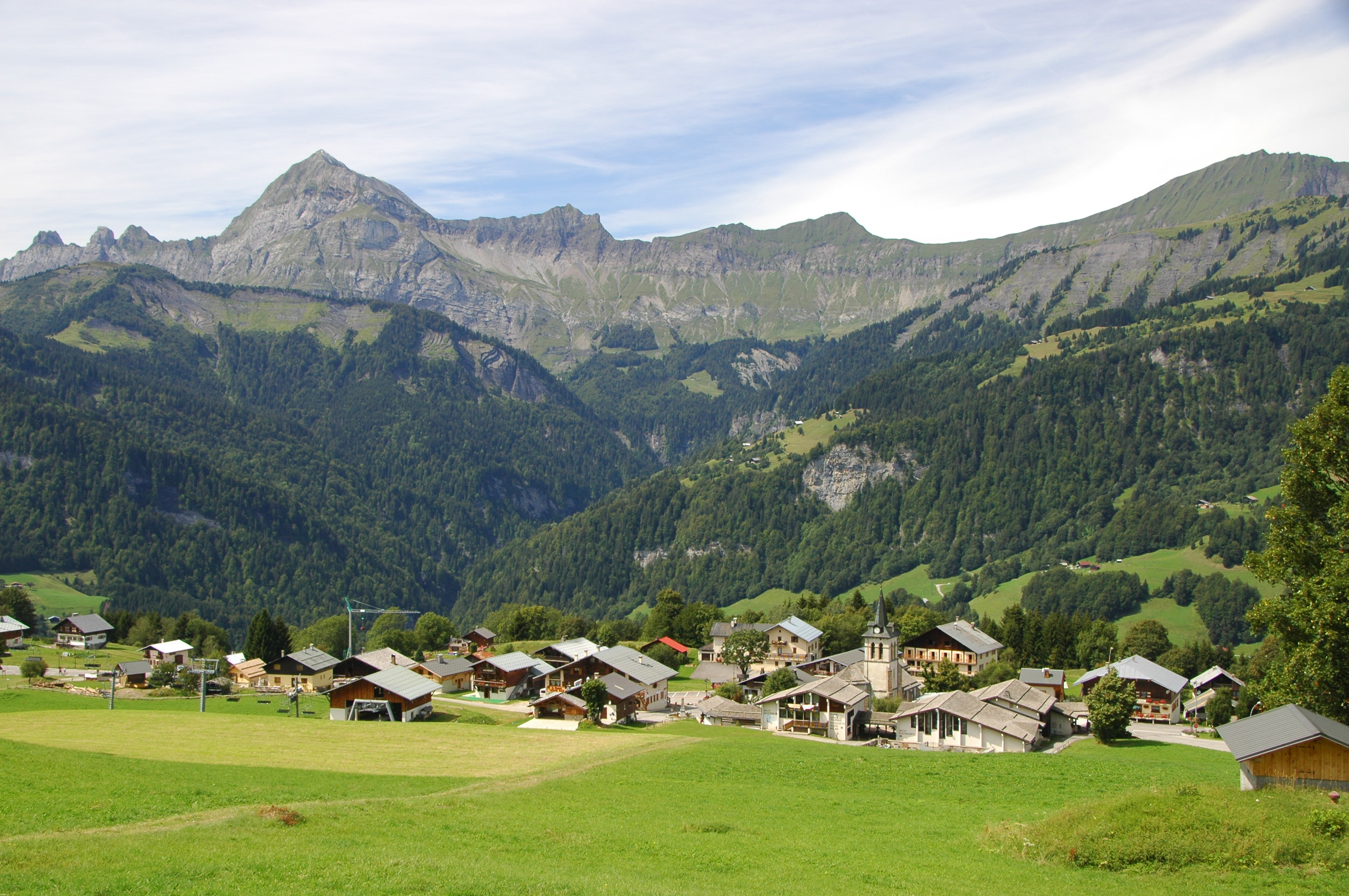 Le centre du village de Crest-Voland (Savoie) vu depuis le hameau de Paravy. Au fond, la chaîne des Aravis et le mont Charvin